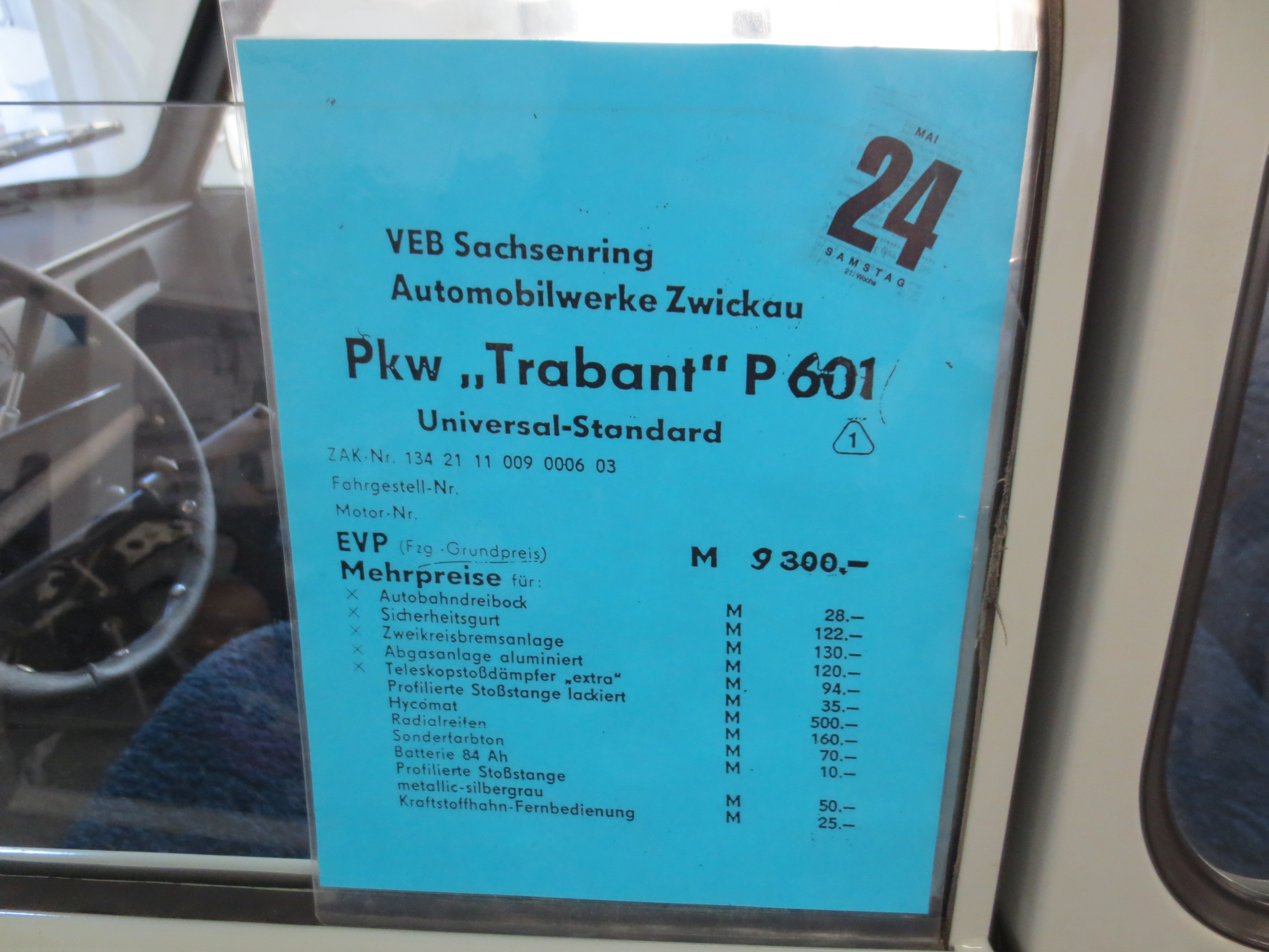 DDR Museum Zeitreise Radebeul Mai 2014 (21)